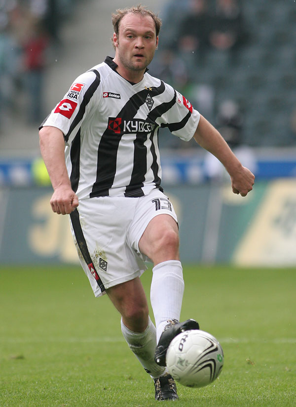 Fußballer Alexander Voigt im Dress von Borussia Mönchengladbach